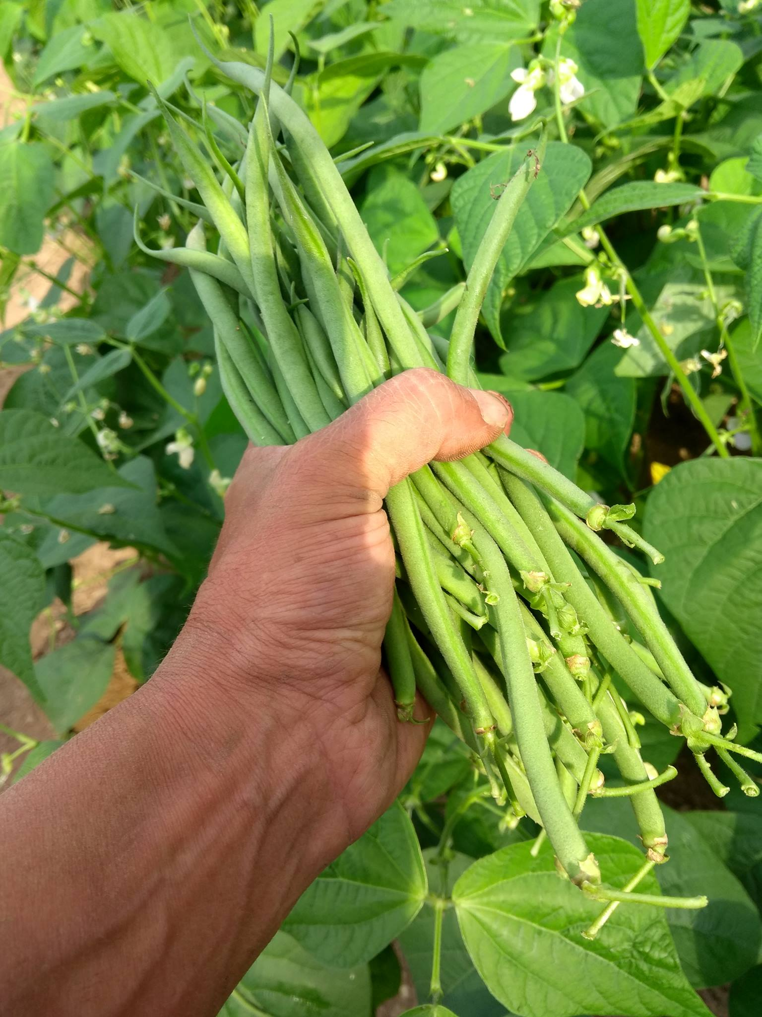 Poignée d'haricots, et plants en floraison en arrière plan